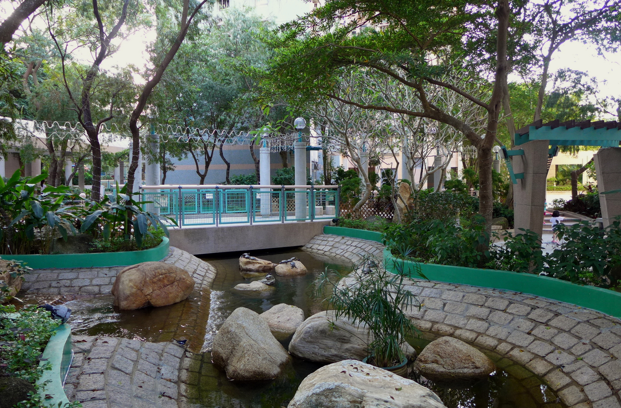 Kam Lung Court Pond